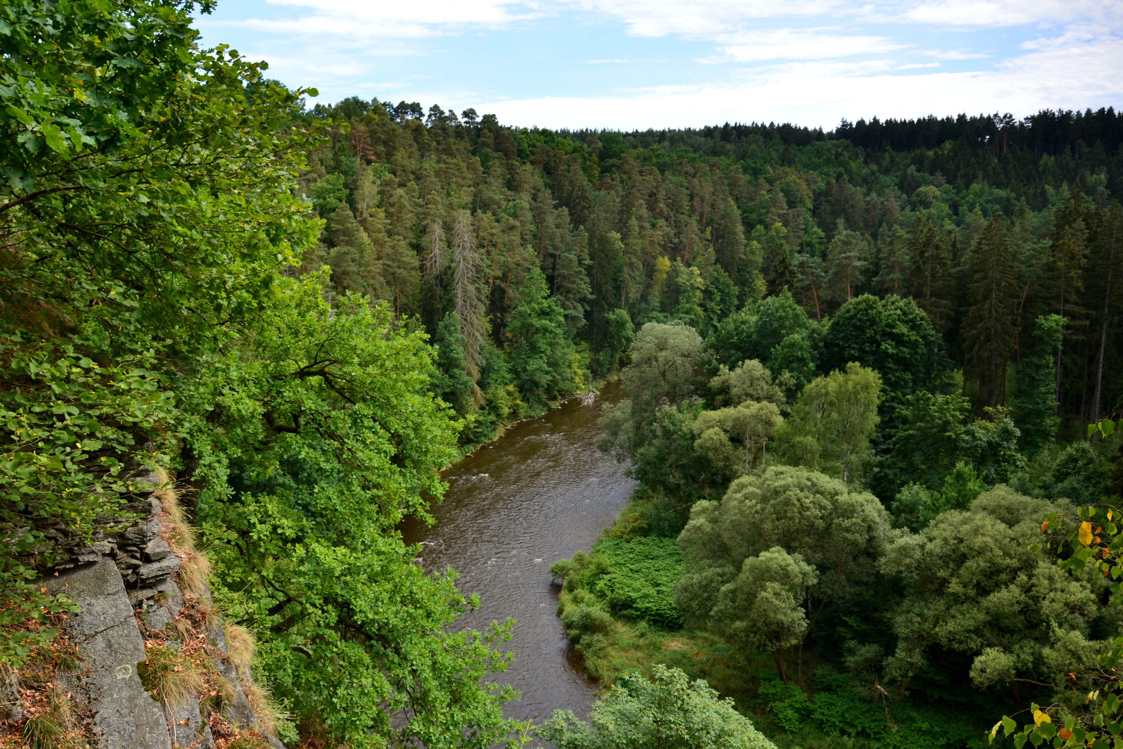 PP Vltava u Blanského lesa - údolí pod zaniklým hradem Maškovec